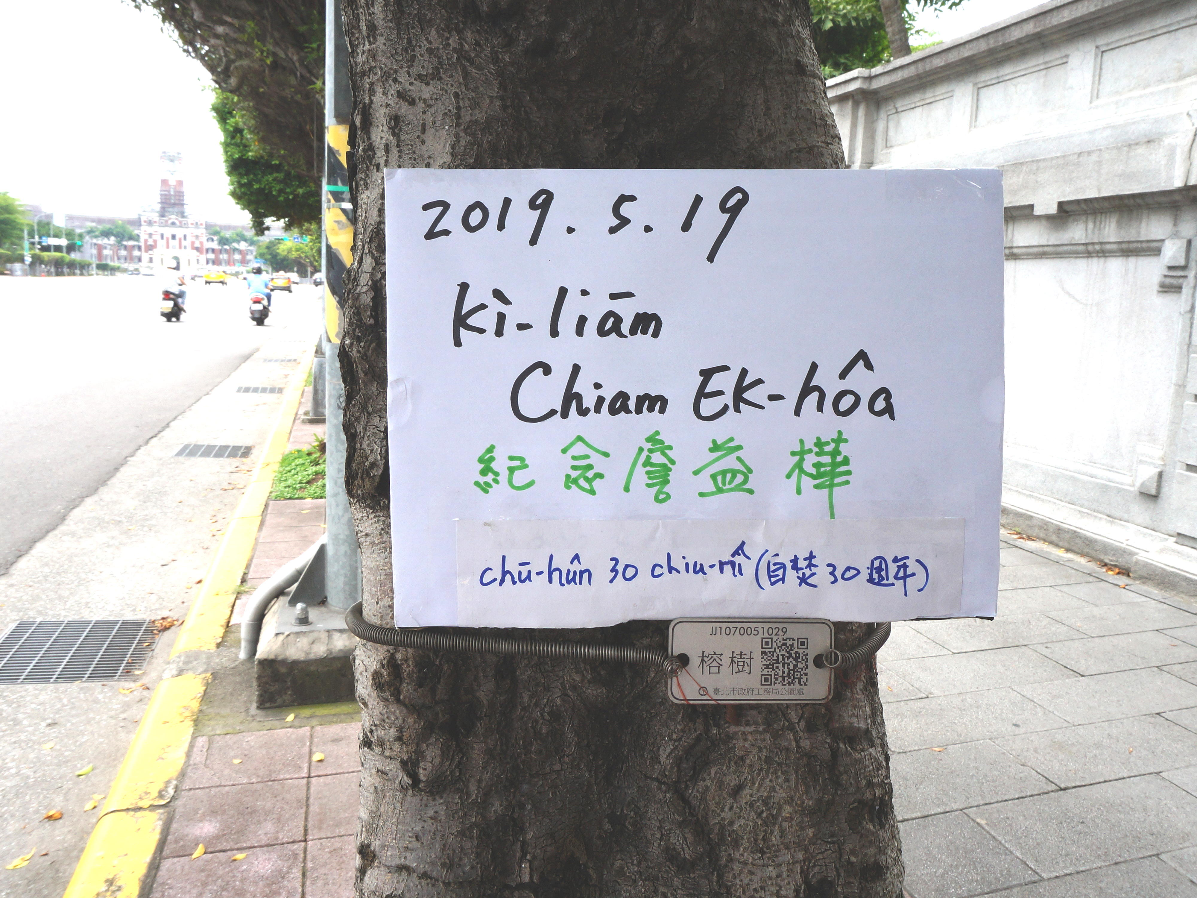 臺北市中正區凱達格蘭大道，臺北賓館外圍人行道榕樹上的「紀念詹益樺自焚30週年」瓦楞紙板。